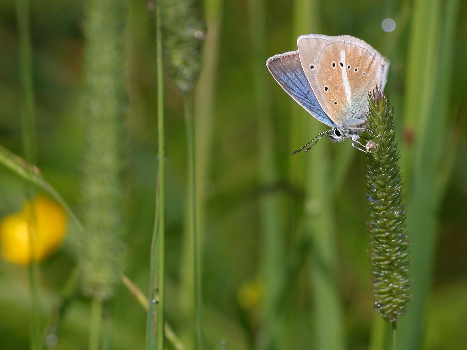 Weißdolch-Bläuling (Polyommatus damon)